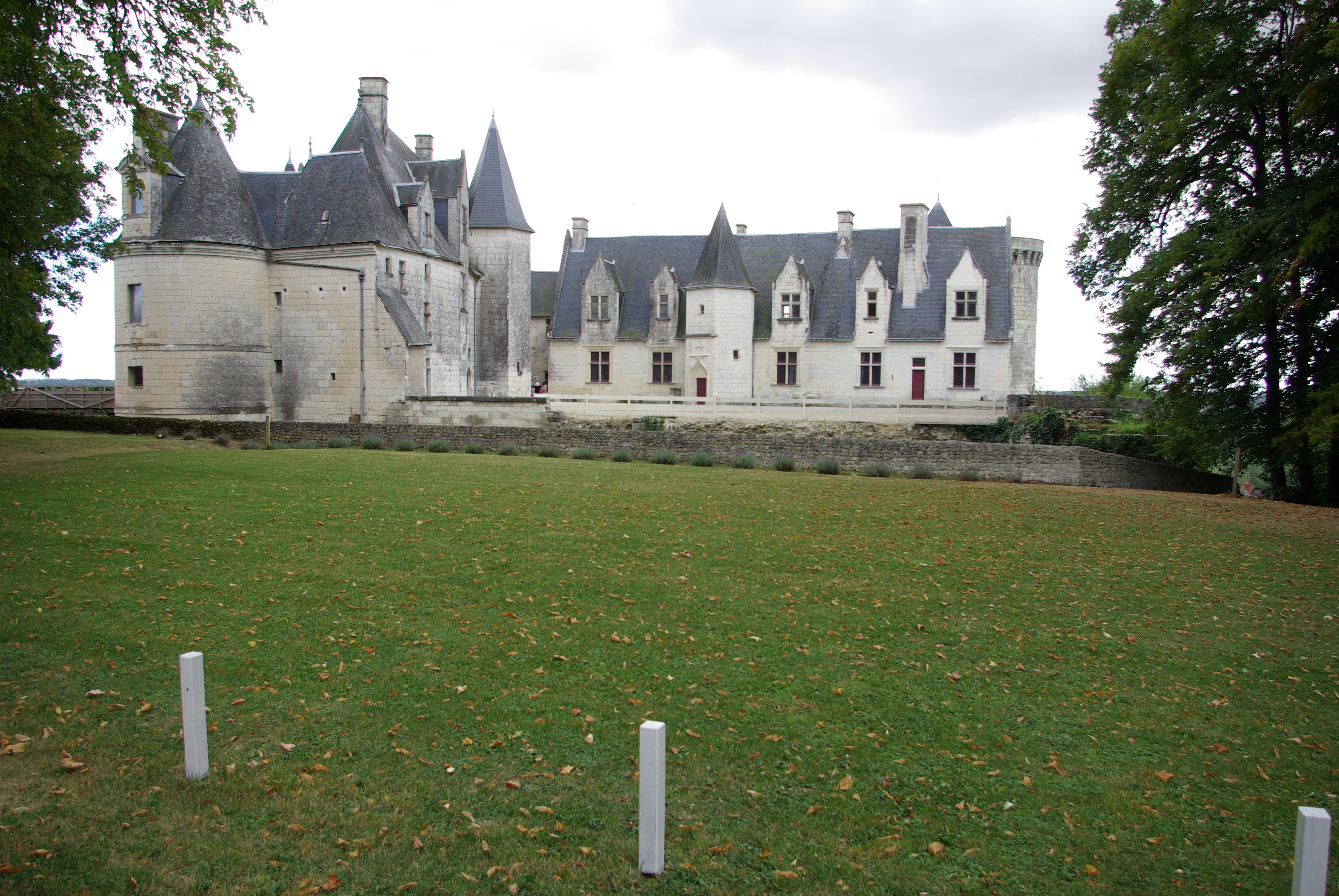 Face Nord du château de Palluau-Frontenac. .